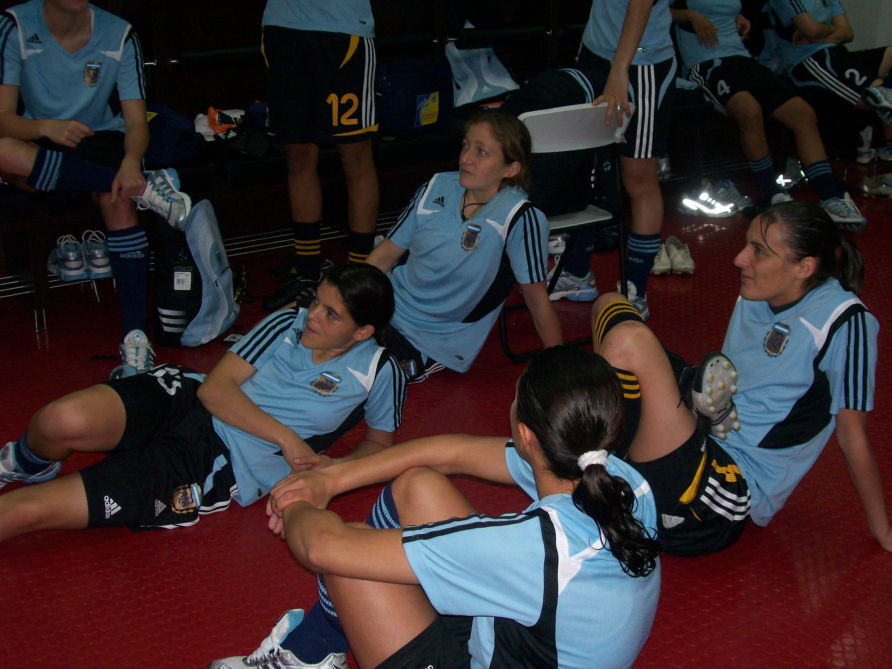 Por segunda vez en la historia Argentina participaba en un mundial FIFA, le tocaba jugar el partido inaugural en el Estadio Hongkou de Shanghai ante las campeonas del mundo vigentes y que revalidarían su título en este certamen.